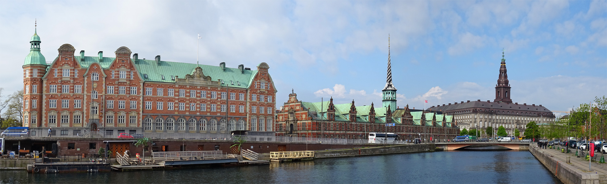 Børsen og Christiansborg Slot, København, Danmark.